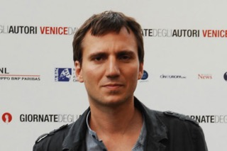 Maderna alle Giornate degli Autori di Venezia nel 2012